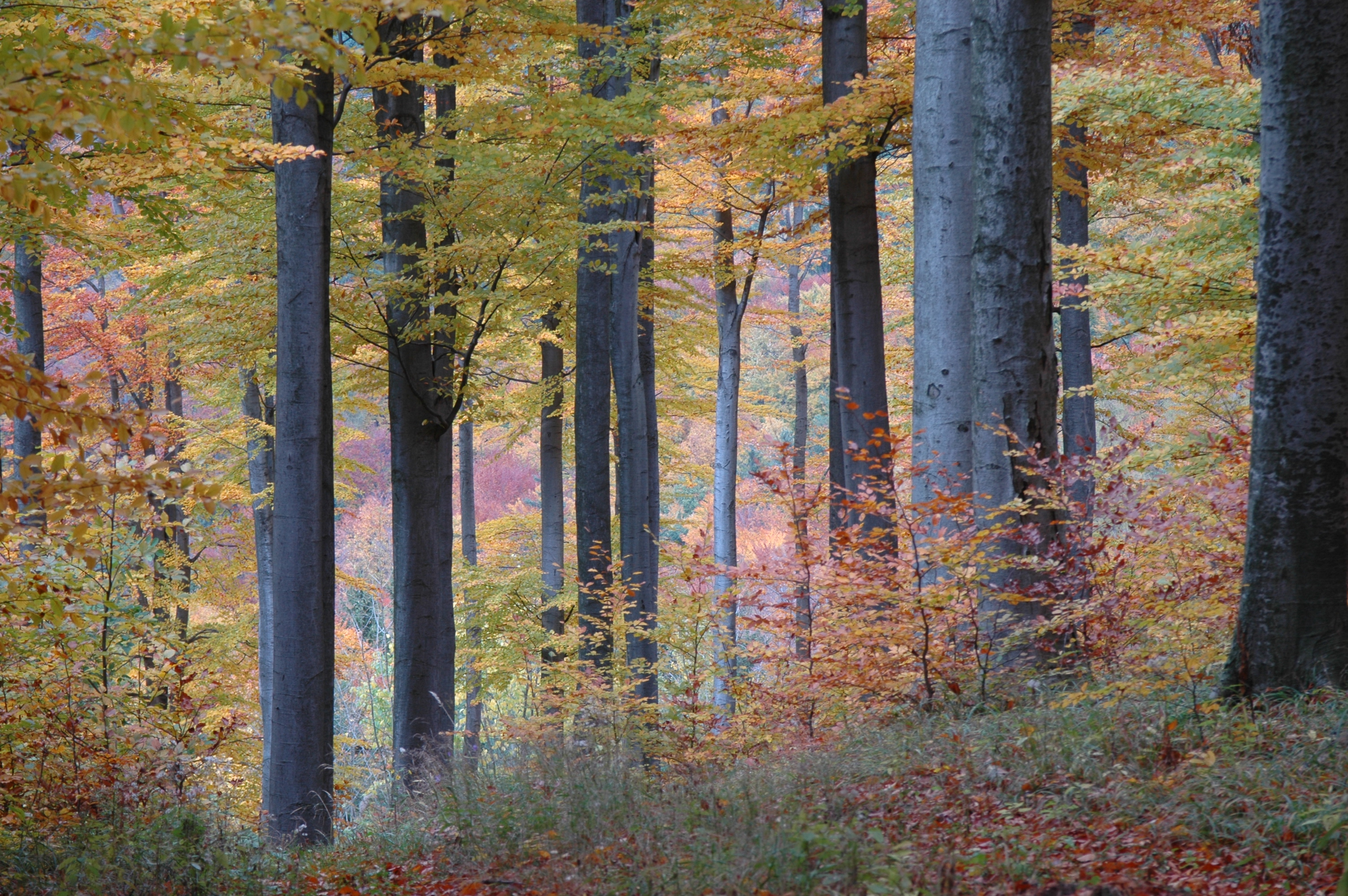 Dunkelsteinerwald - Herbstverfärbung